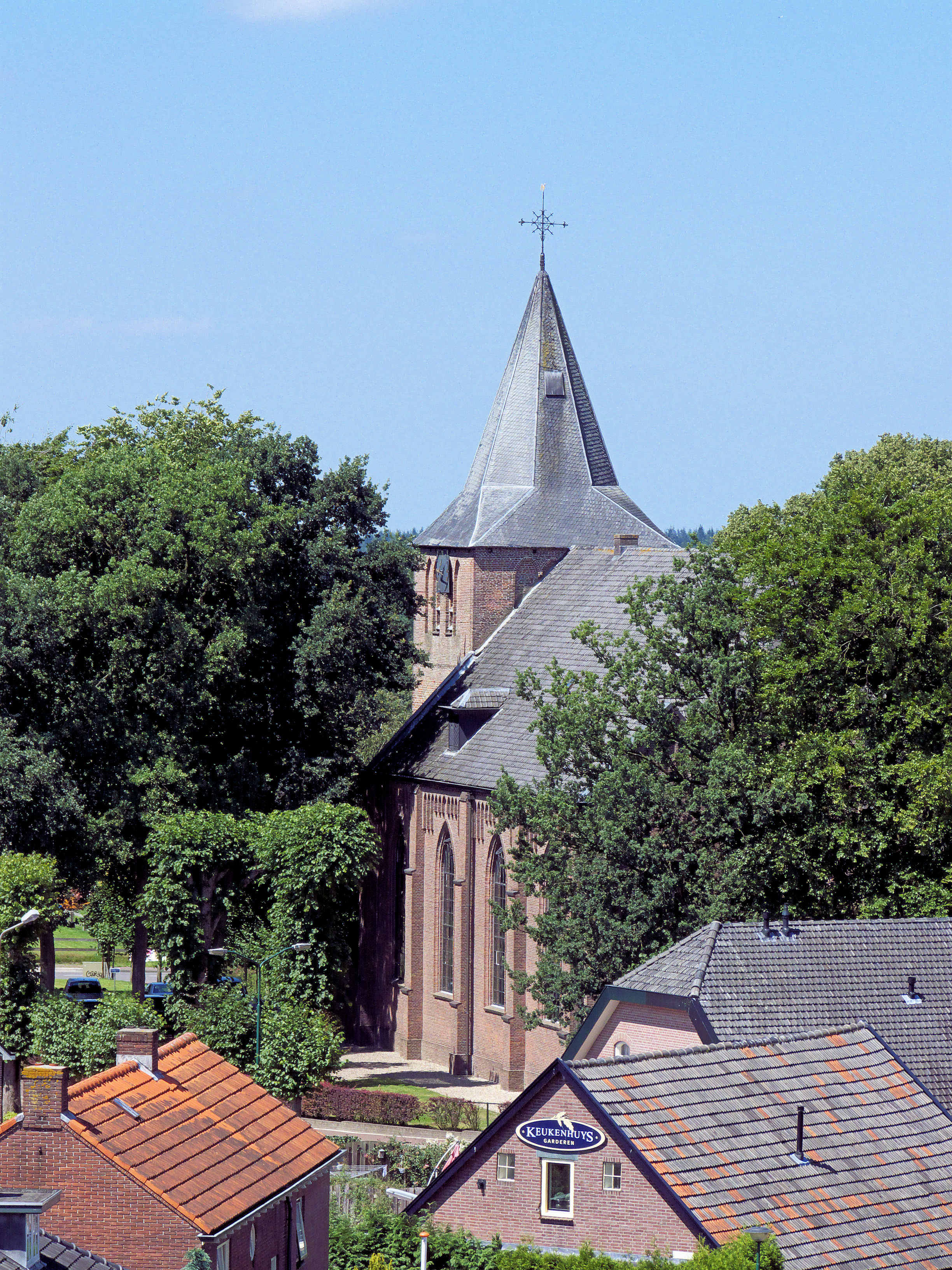 Kerk vanaf molen De Hoop gezien in Garderen. Kerkgebouw in gebruik door de Hersteld Hervormde Gemeente en PKN.